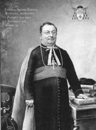 Jean Baptiste Decrolière (1839-1899) - bisschop van Namen (1892-1899) - Namen - België